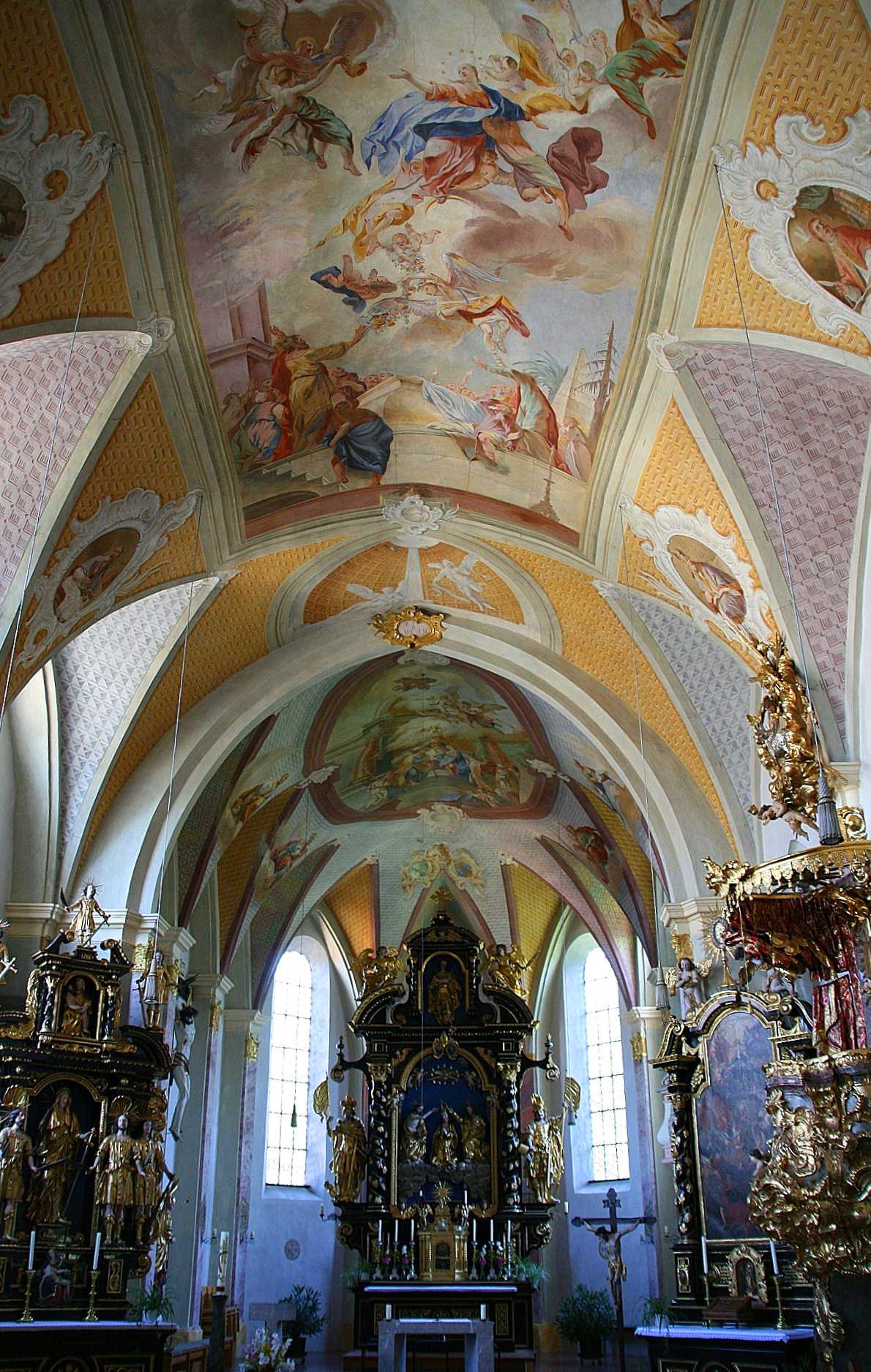 Der Innenraum der Pfarr- und Wallfahrtskirche St. Mariä Himmelfahrt in Pürten (Stadt Waldkraiburg, Landkreis Mühldorf am Inn, Oberbayern). Blick durch das Langhaus zum Chor mit Hochaltar. Die Altäre und die Kanzel zeigen wertvolle Barock-Gestaltung (Kanel in Rokoko-Manier). Insgesamt ein barockisierter spätgotischer Innenraum.